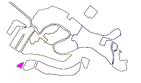 Localizzazione di Sacca San Biagio.